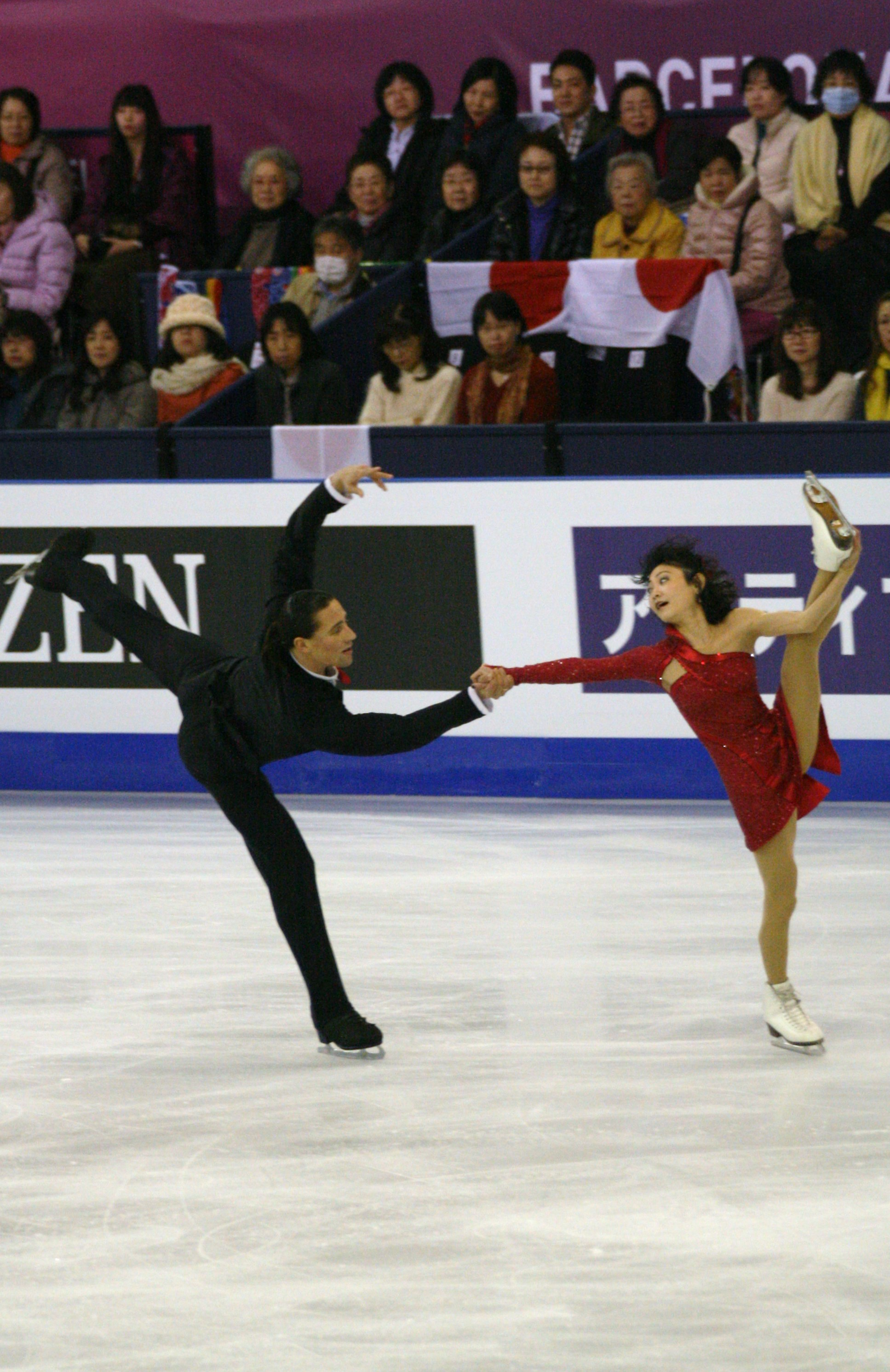 Юко Кавагути и Александр Смирнов (Россия) на финале Гран-при по фигурному катанию 2015-2016.